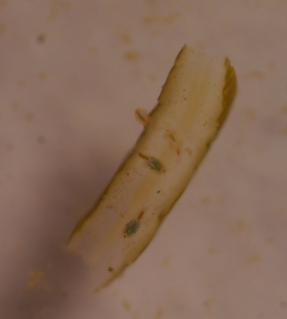 Tigriopus sp.(T. japonicus?) 2015/06/16 和歌山県田辺市：Tanabe City. Wakayama Pref. Japan 乾燥コンブの破片を食べている。eating dried Kombu